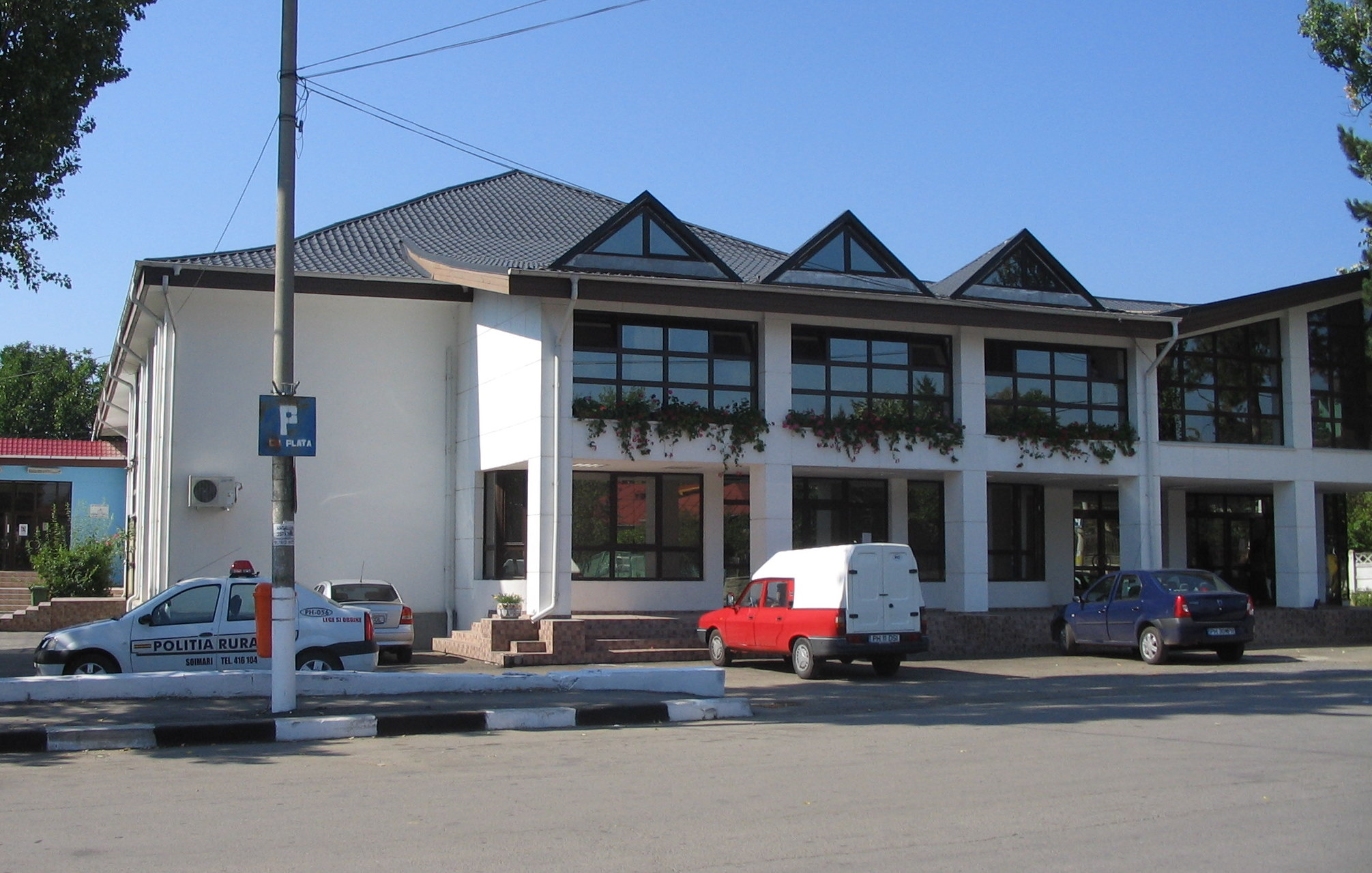 Casa de cultură din Vălenii de Munte, jud.Prahova